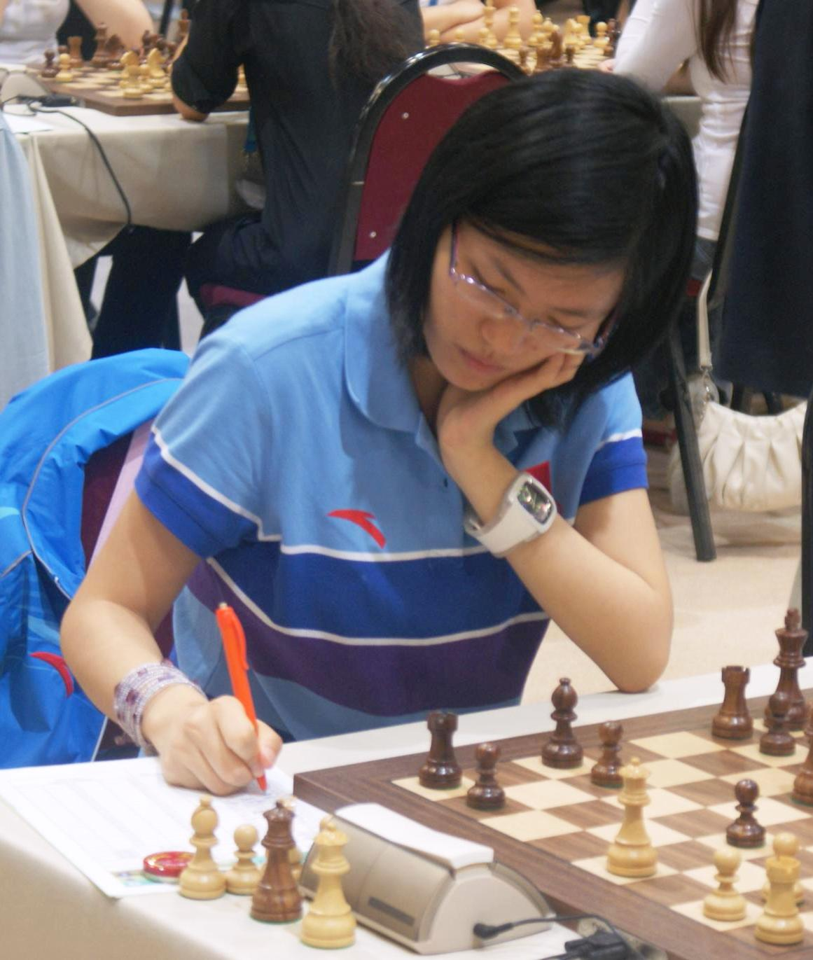 Hou Yifan, 40 Olimpíades d'Escacs - Istanbul, Ronda 07, 4 de setembre del 2012